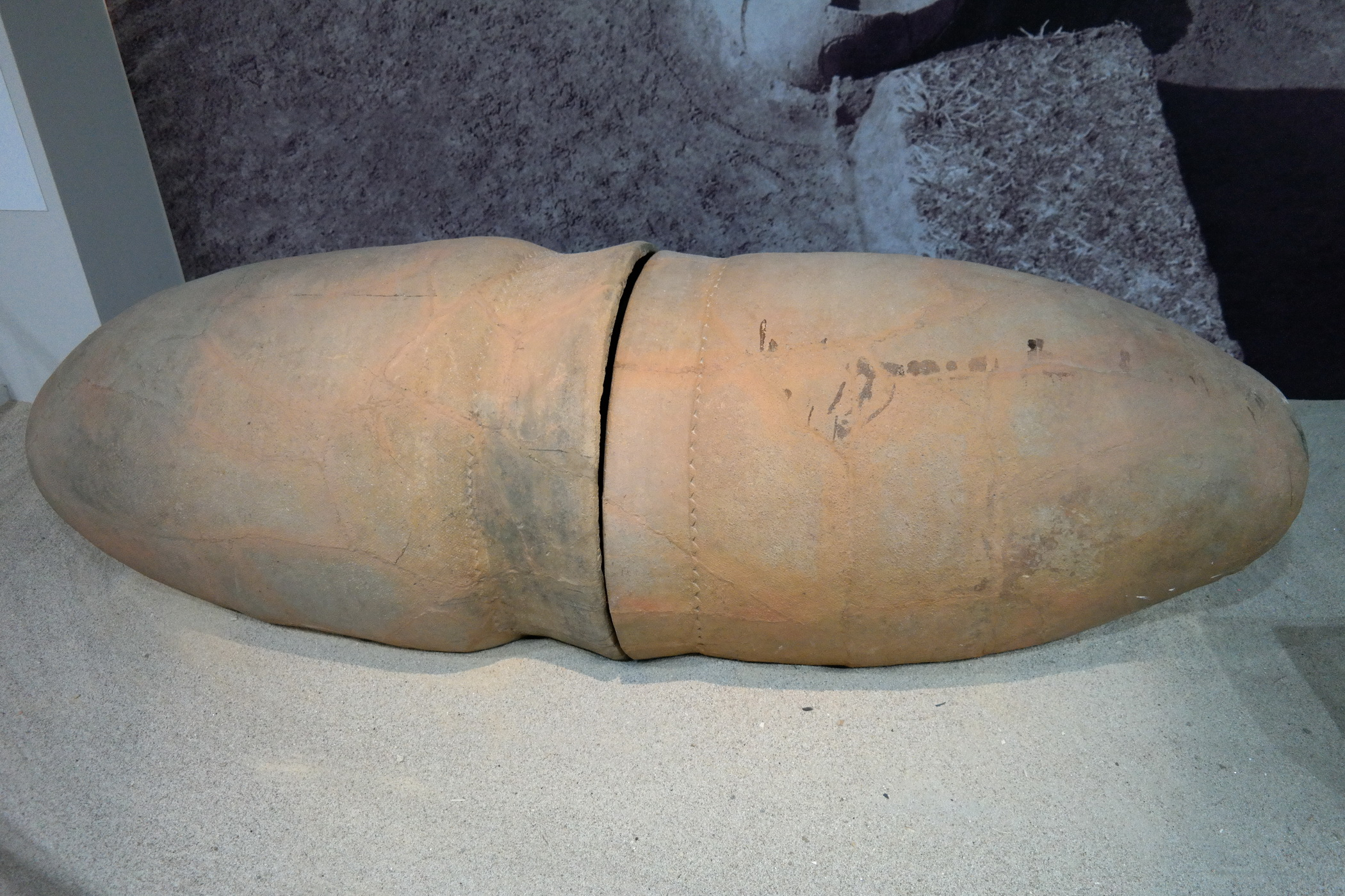 전남 영암 월송리에서 출토된 독널(옹관) (국립광주박물관 소장)